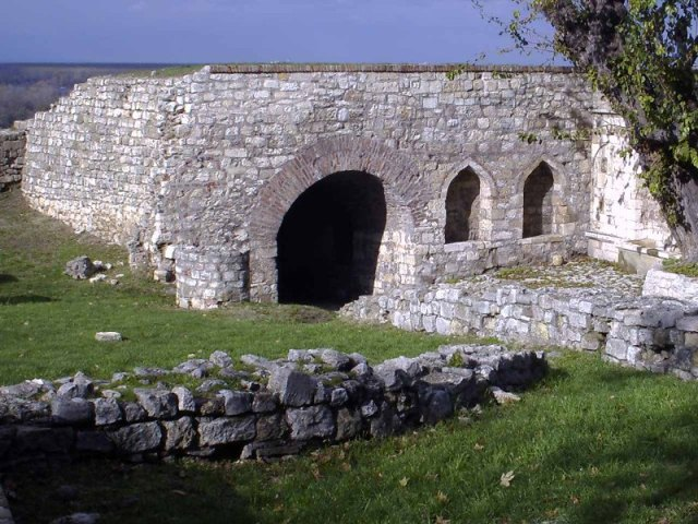 Srpskohrvatski / српскохрватски: Defterdarova kapija na Beogradskoj tvrđavi